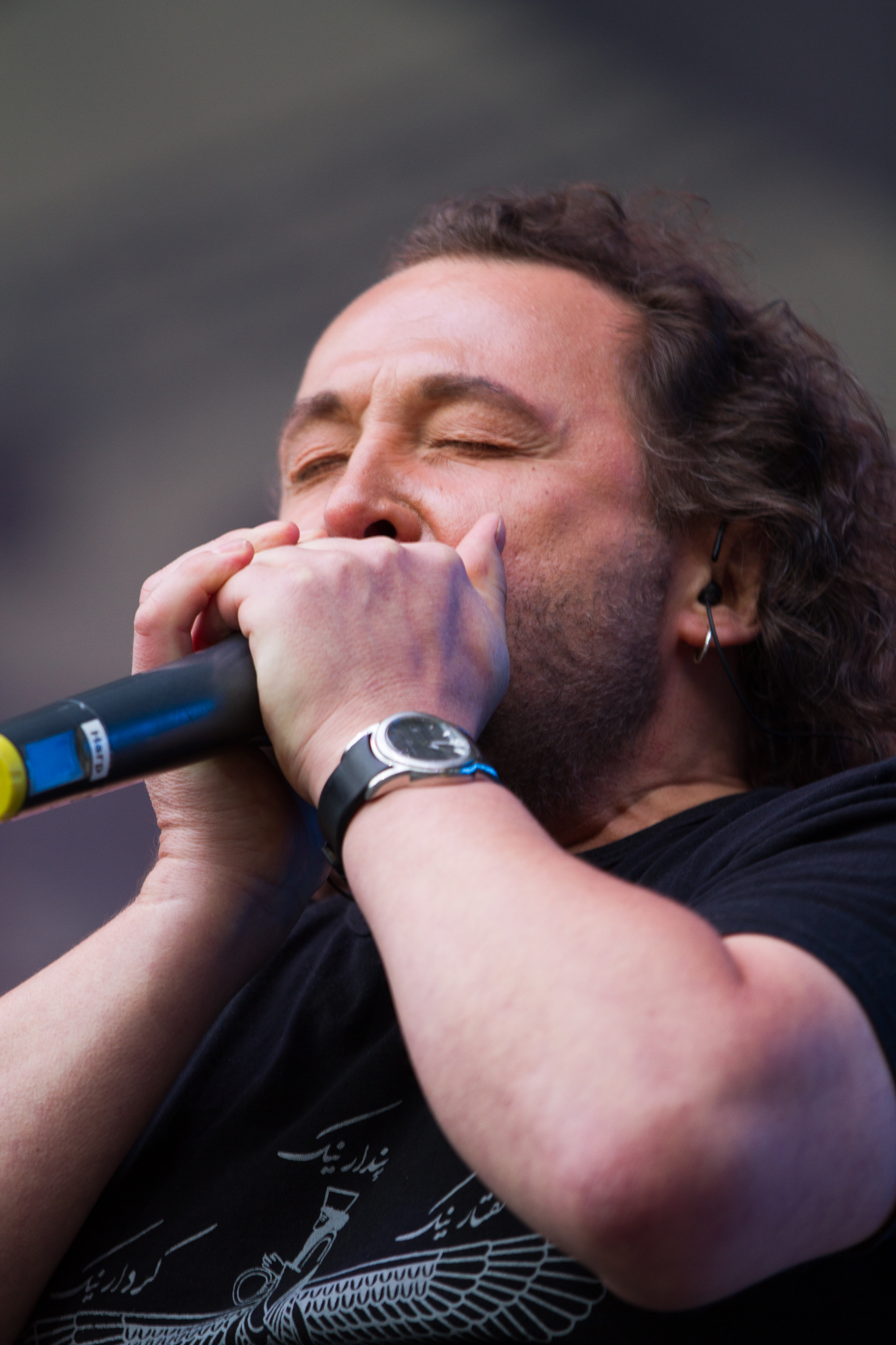 Martin Becker Keyboarder der Band Karat beim "Karat 40 Jahre KARAT - Das EINZIGE Jubiläumskonzert" in der Berliner Waldbühne am 20.06.2015